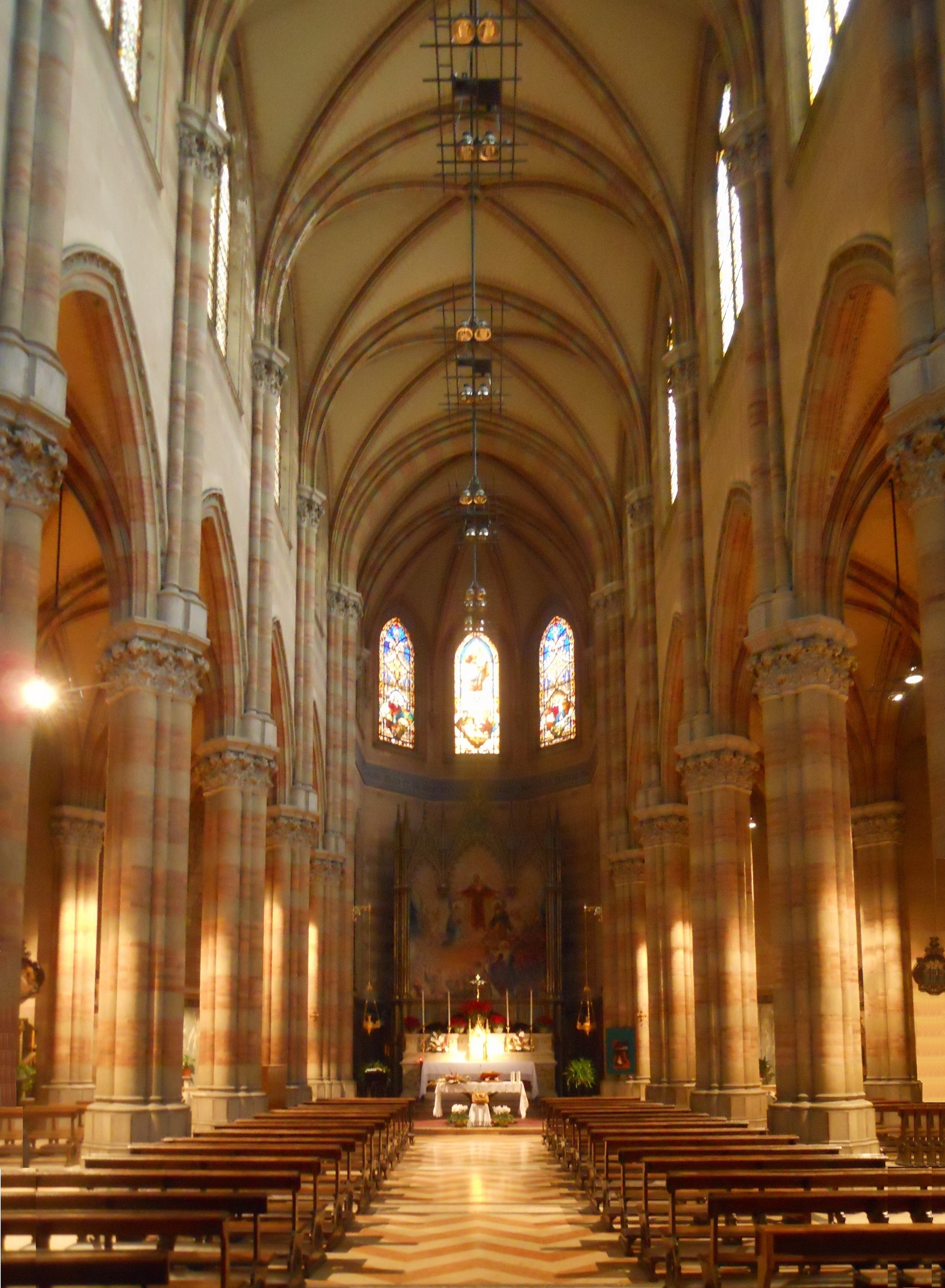 Roma, Chiesa del Sacro Cuore del Suffragio, interno